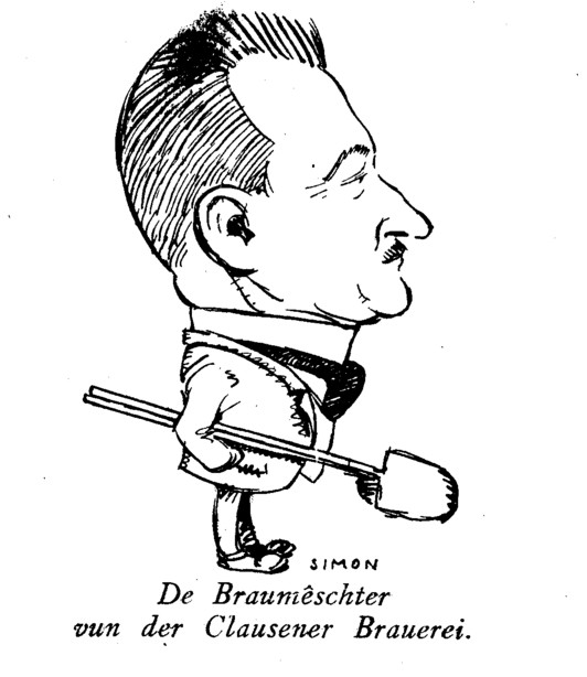 Rudolf Strnisko - toen brouwer in Clausen in Luxemburg